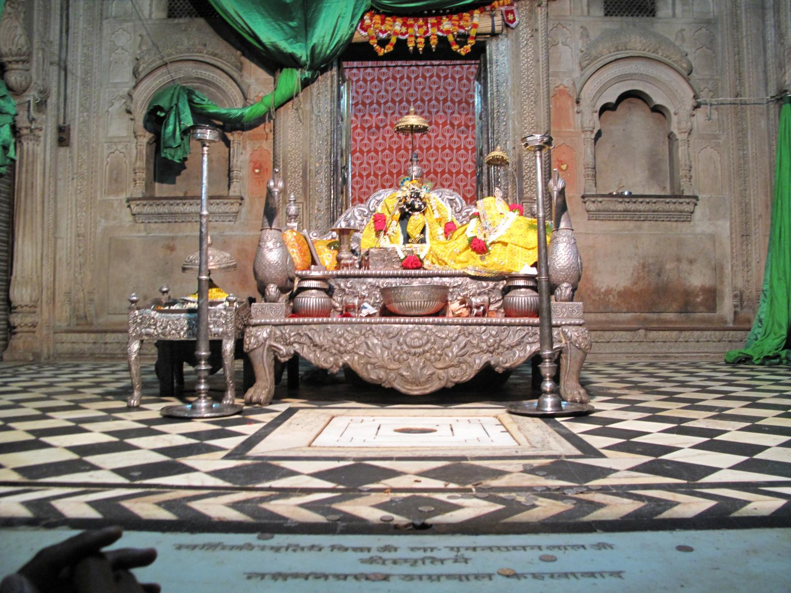 Radha Raman Temple, Vrindavan